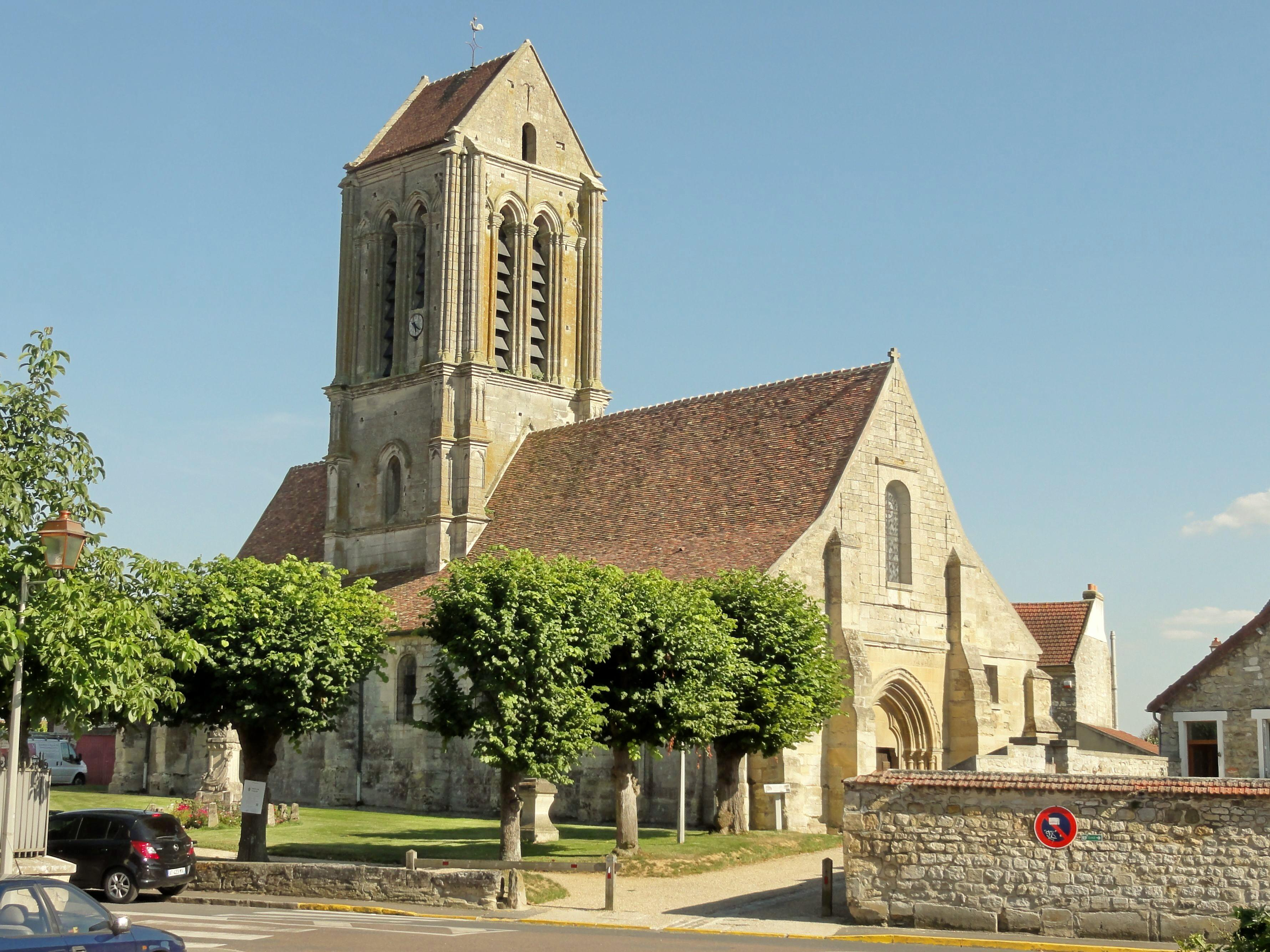 Vue depuis le nord-ouest.